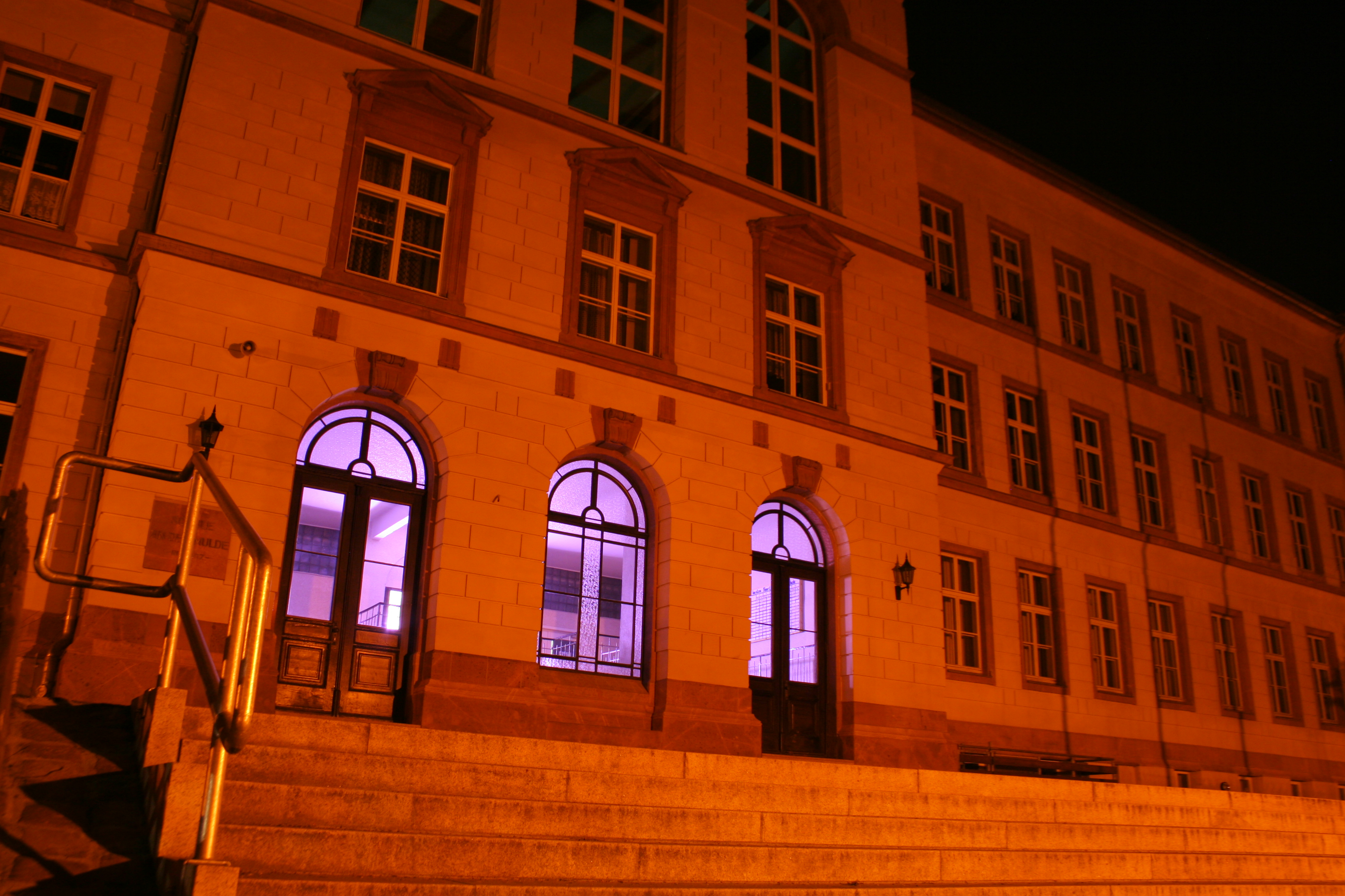 Muldenschule